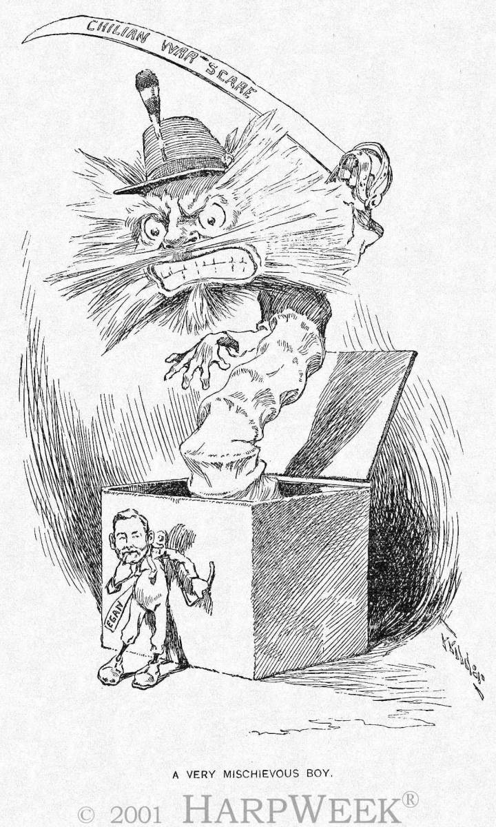 La caricatura acusa a Patrick Egan, el ministro de los EEUU para Chile, poniéndolo como un chico travieso que ha abierto una caja de sorpresas amenazante, con una espada que dice "Susto de la Guerra con Chile".